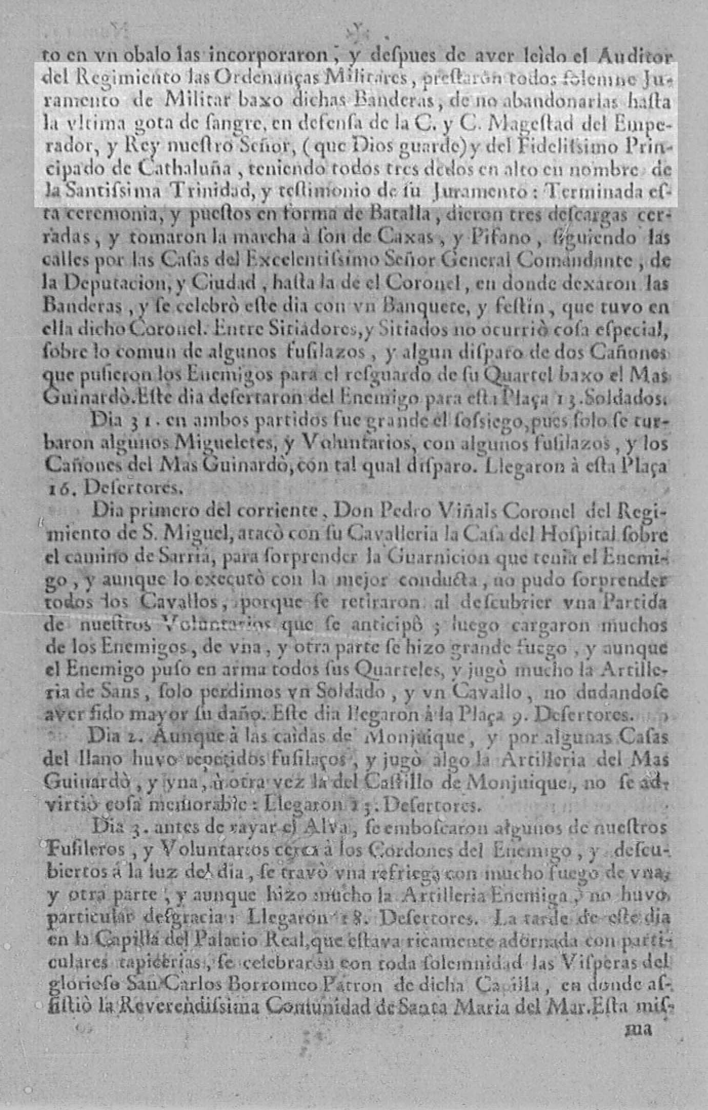 La Gazeta de Barcelona - Diario del Sitio de Barcelona (1713-1714)